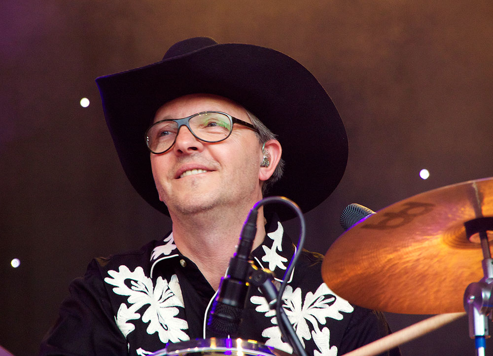 Olli Dittrich bei Texas Lightning. Konzert in Bonn am 03.10.2011.